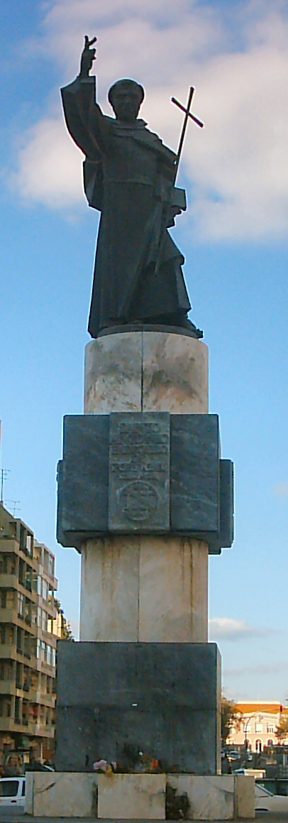 Estátua de Santo António de Lisboa na Praça de Alvalade em Lisboa